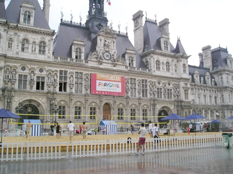 Place de l'hôtel de ville de Paris pendant Paris Plages (où l'on peut jouer au volley sur du sable). On peut observer l'affiche où la ville de Paris se porte candidate pour les Jeux olympiques d'été de 2012. Août 2004.